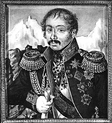 Baron Grigorii Vladimirovich Rozen, 1782-1841